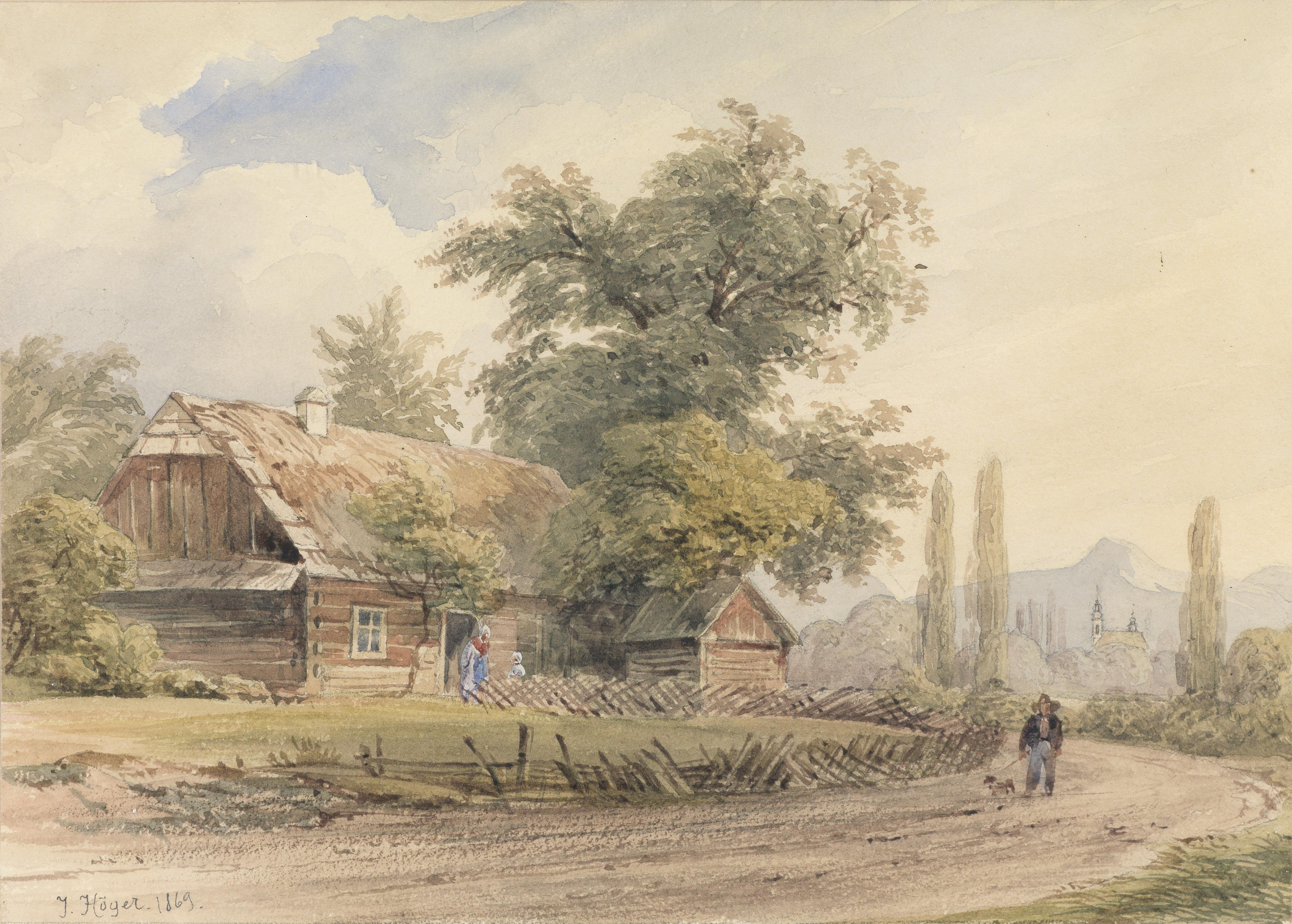 Motiv aus Paskau bei Ostrava